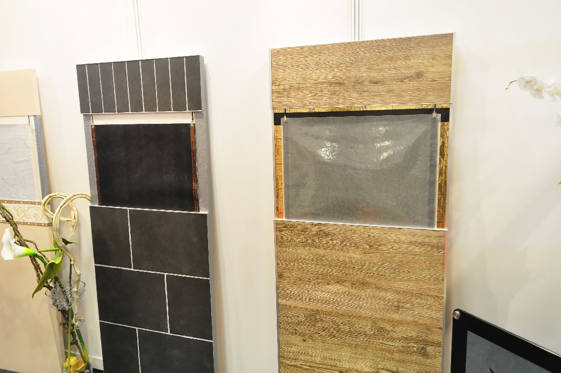 Haus & Energie 2015 in Sindelfingen.